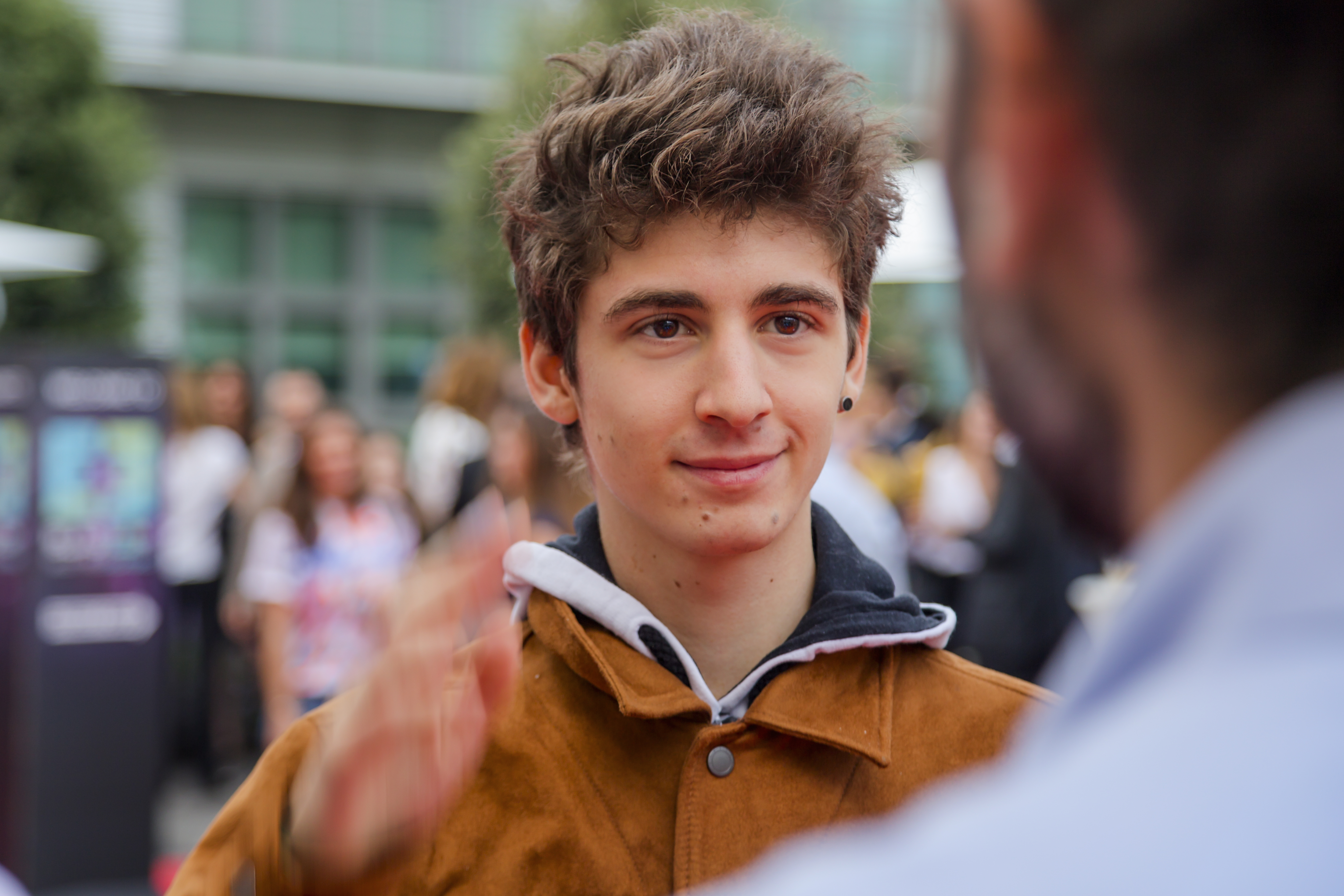 Fotografia di Lorenzo Ostuni (Favij) all'inaugurazione del Blasteem House